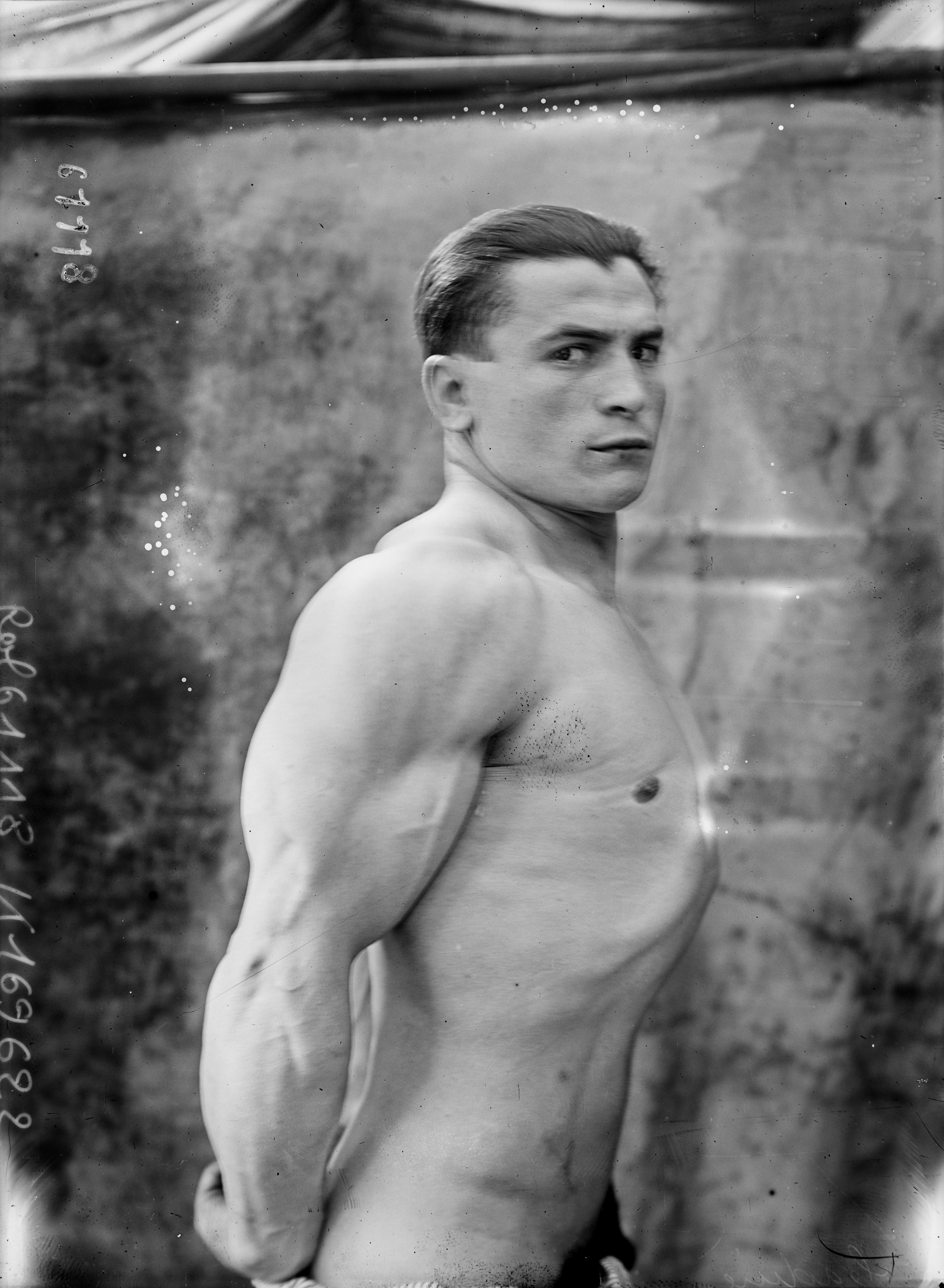 Portrait de l'haltérophile Ernest Cadine.